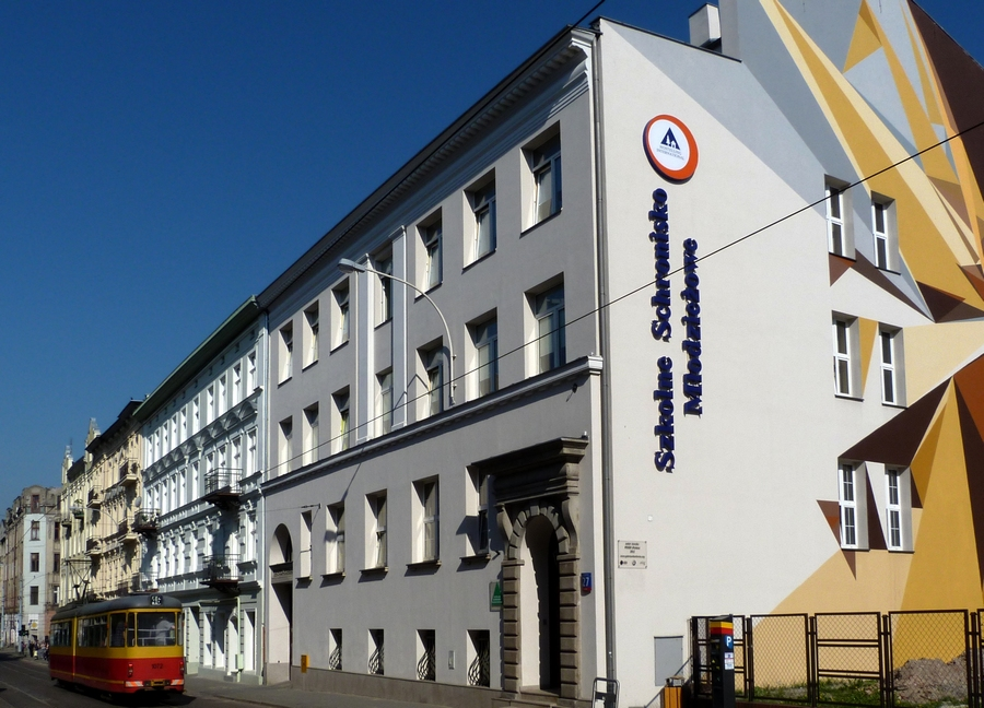 Hostel